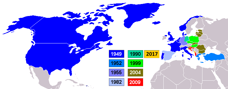 NATO COUNTRIES